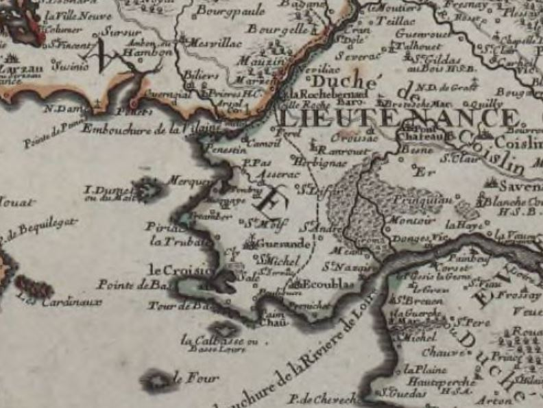 La presqu'île de Guérande (extrait de la carte de la province de Bretagne divisée en grandes parties de Jean-Baptiste Nolin éditée en 1695)